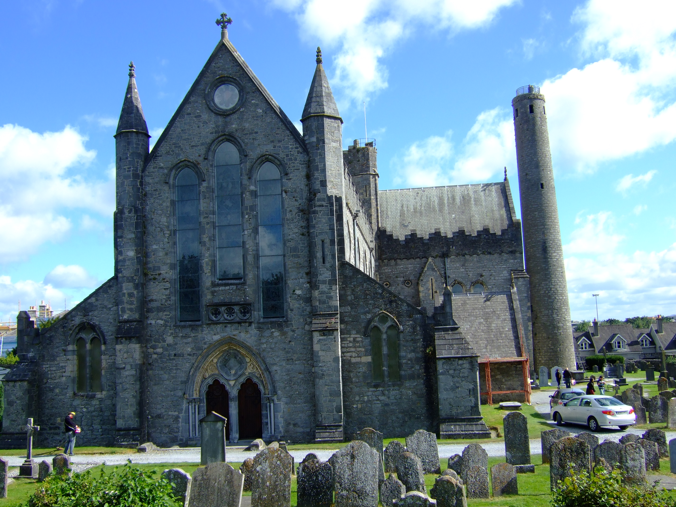 Kilkenny.